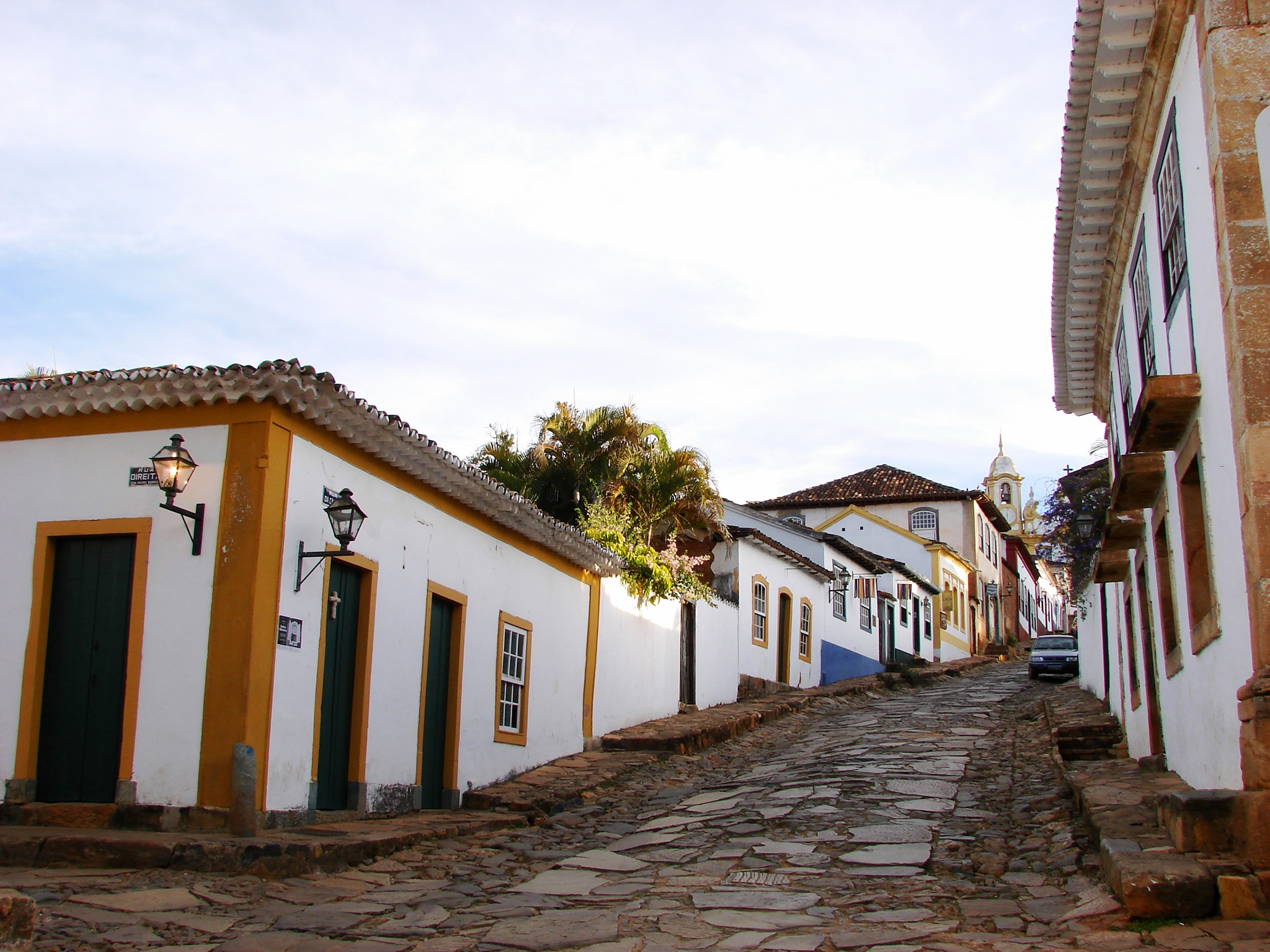 Centro histórico de Tiradentes